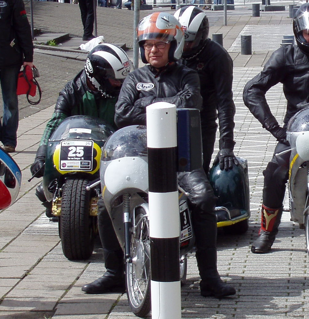 Dit is gemaakt door mij tijdens de eerste editie van Bavaria City Racing in Rotterdam, toen nog Monaco aan de Maas genoemd, in 2005.